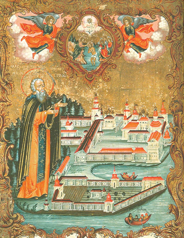 Нил Столобенский